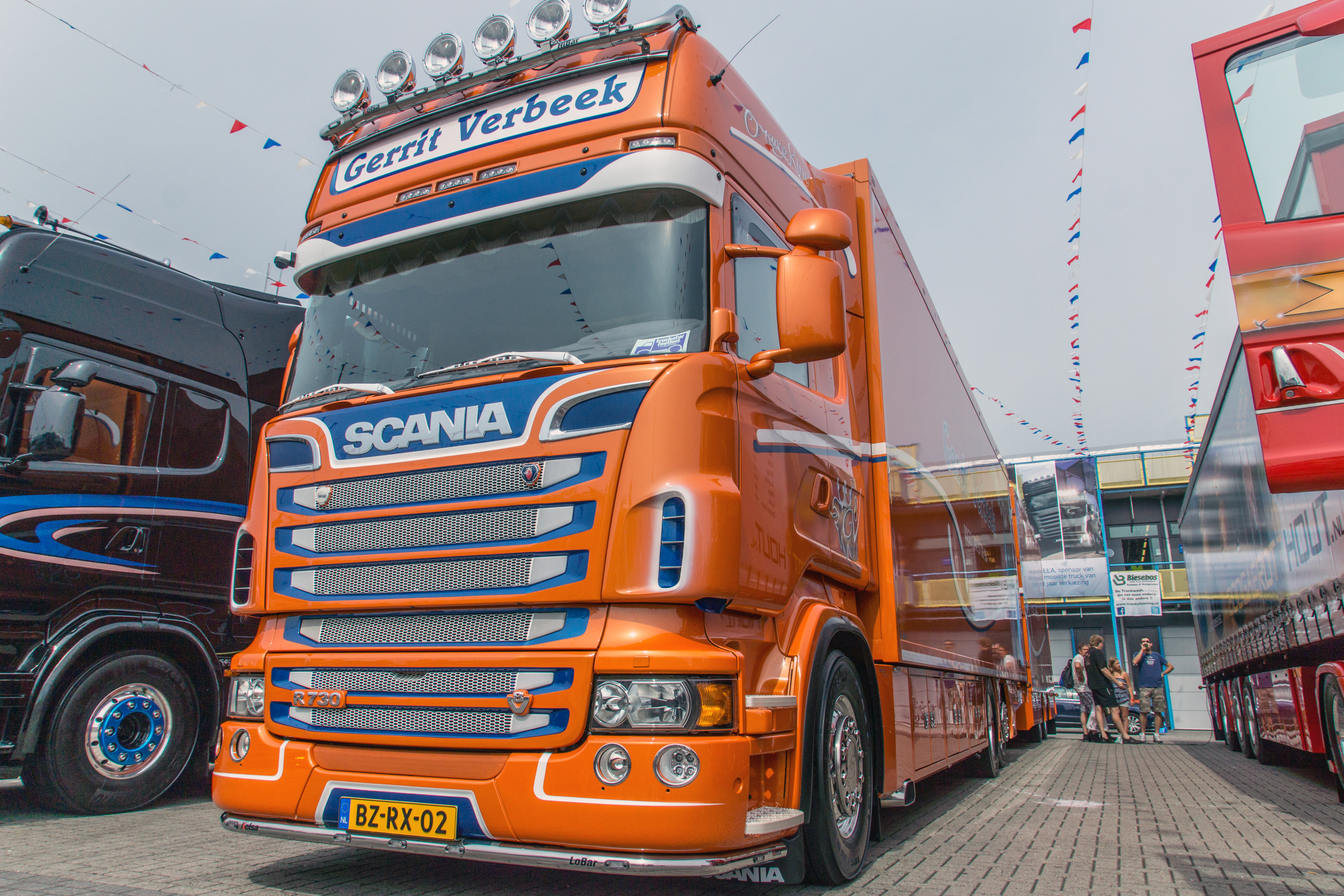 Scania Gerrit Verbeek